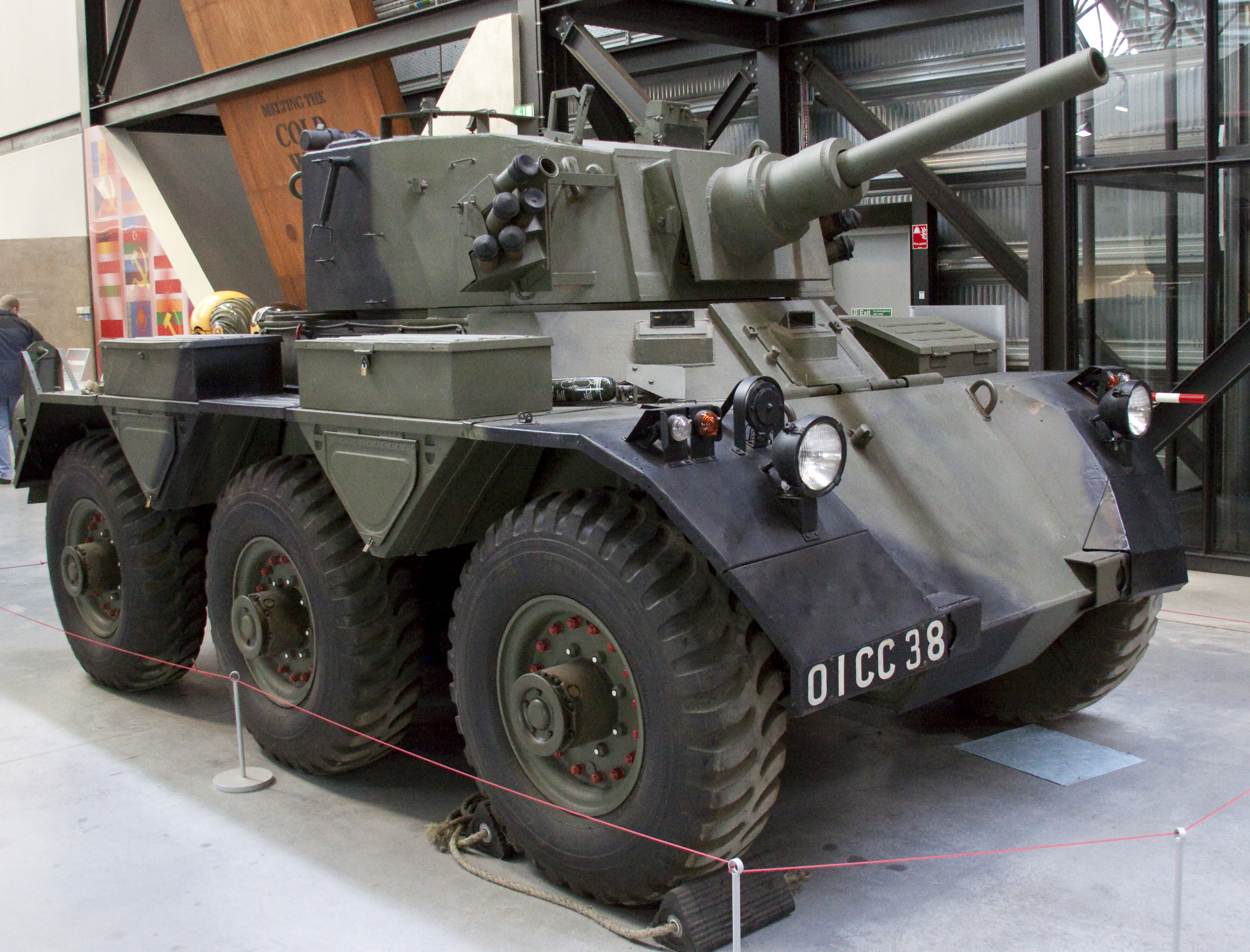 Saladin